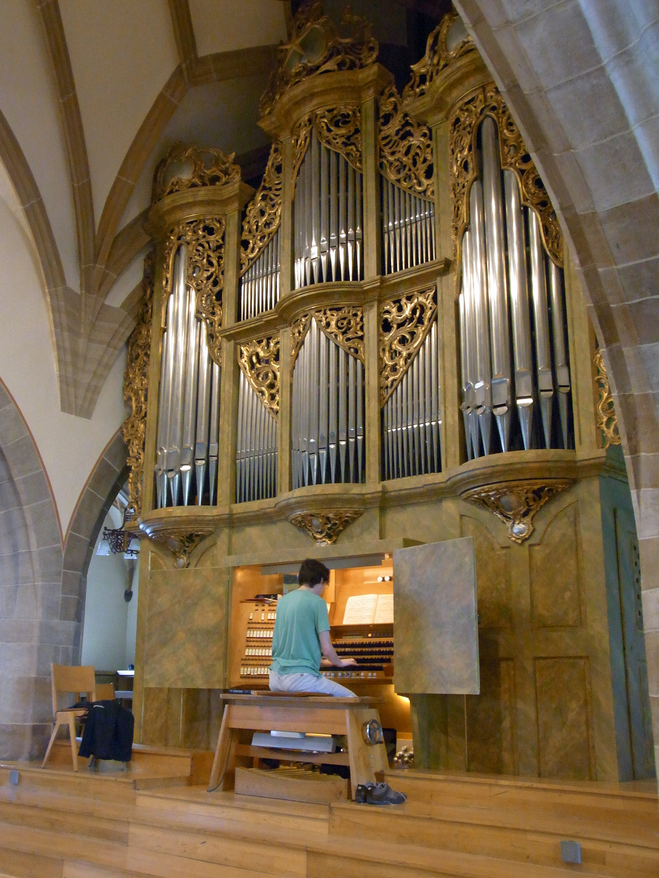 Balingen: Stadtkirche - Orgelempore